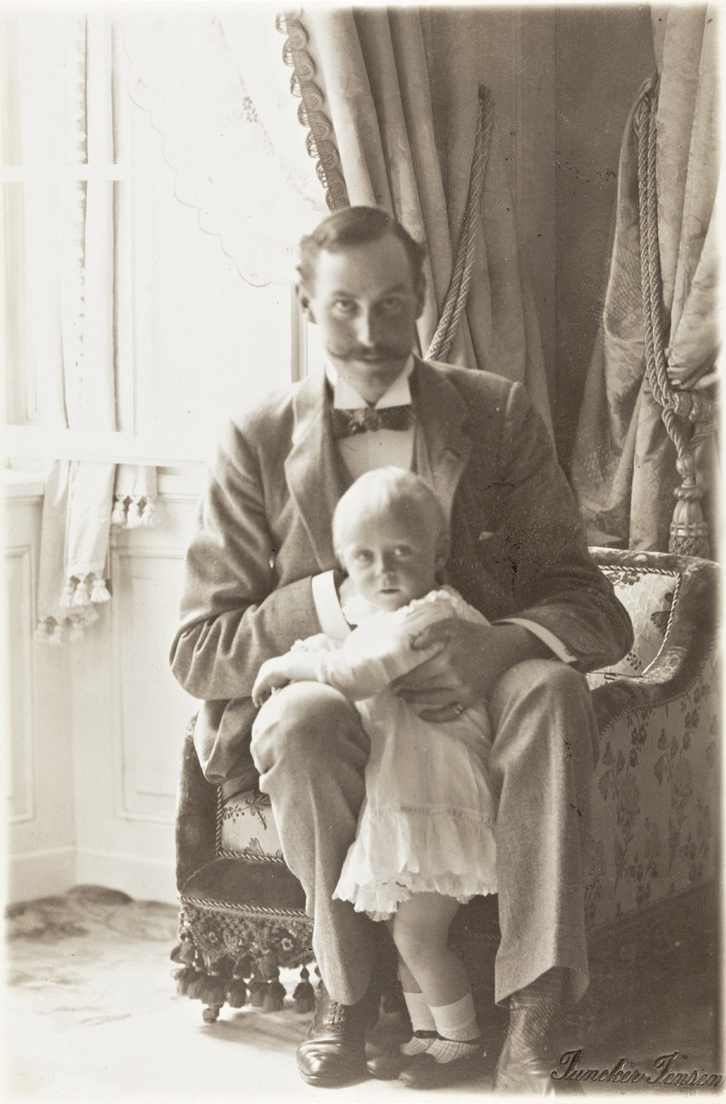 Tittel / Title: Portrett av Kong Haakon VII og Kronprins Olav / King Haakon VII and Crown Prince Olav Dato / Date: 1905 Fotograf / Photographer: Juncker Jensen (Kjøbenhavn) Sted / Place: Danmark, København Eier / Owner Institution: Nasjonalbiblioteket / National Library of Norway Lenke / Link: Bildesignatur / Image Number: blds_04770